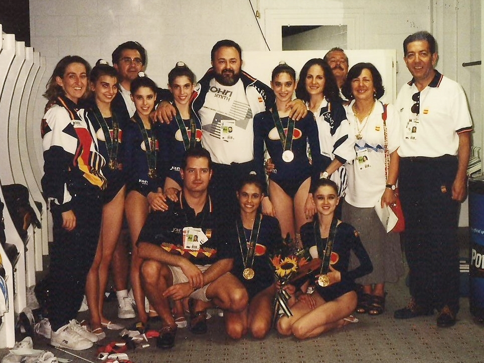 El conjunto español de gimnasia rítmica tras lograr la medalla de oro en los Juegos Olímpicos de Atlanta 1996, junto a otros miembros del equipo y varios directivos. De pie, de izquierda a derecha: María Fernández (entrenadora del conjunto), Marta Baldó, Luis González Lago (médico del equipo), Tania Lamarca, Lorena Guréndez, Amador Cernuda (psicólogo del equipo), Estíbaliz Martínez, Marisa Mateo (coreógrafa del conjunto), Eduardo Jiménez (técnico del CSD), Emilia Boneva (seleccionadora nacional) y Pedro Antonio Martín Marín (presidente del CSD). Sentados: Raúl Ruiz (fisio del equipo), Estela Giménez y Nuria Cabanillas.